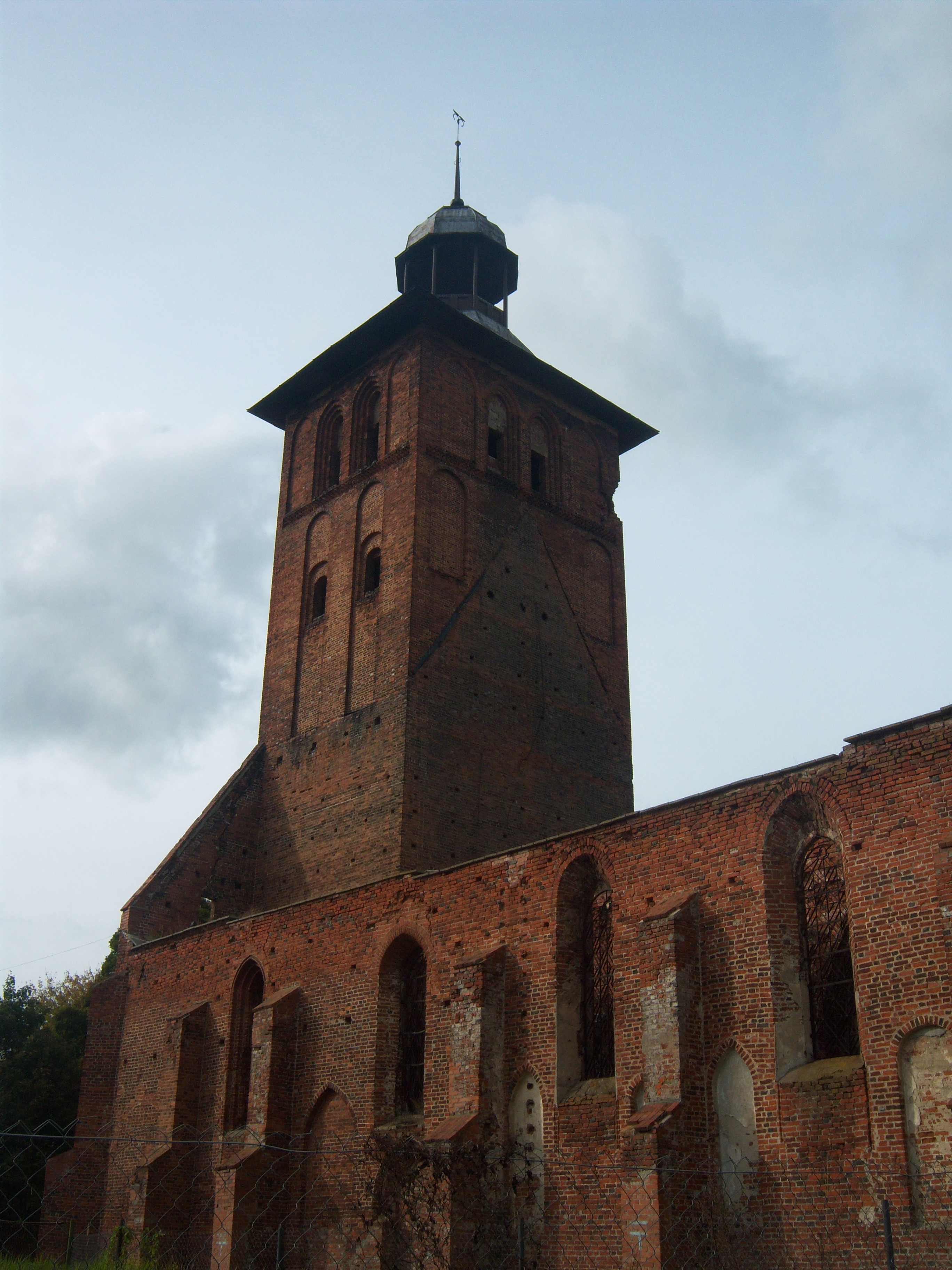 Снимок сделан осенью в г. Знаменск. Башня кирхи сохранилась довольно хорошо, наверху даже видна смотровая площадка, на которую,к сожалению,не удалось попасть.